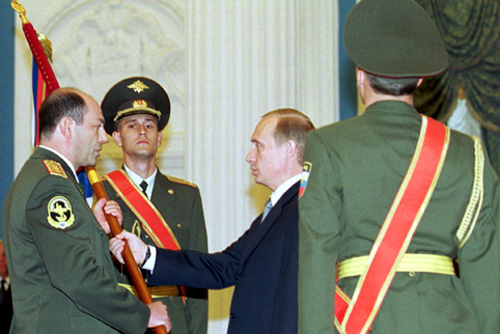 МОСКВА, КРЕМЛЬ. Церемония вручения штандарта Министру внутренних дел Владимиру Рушайло.